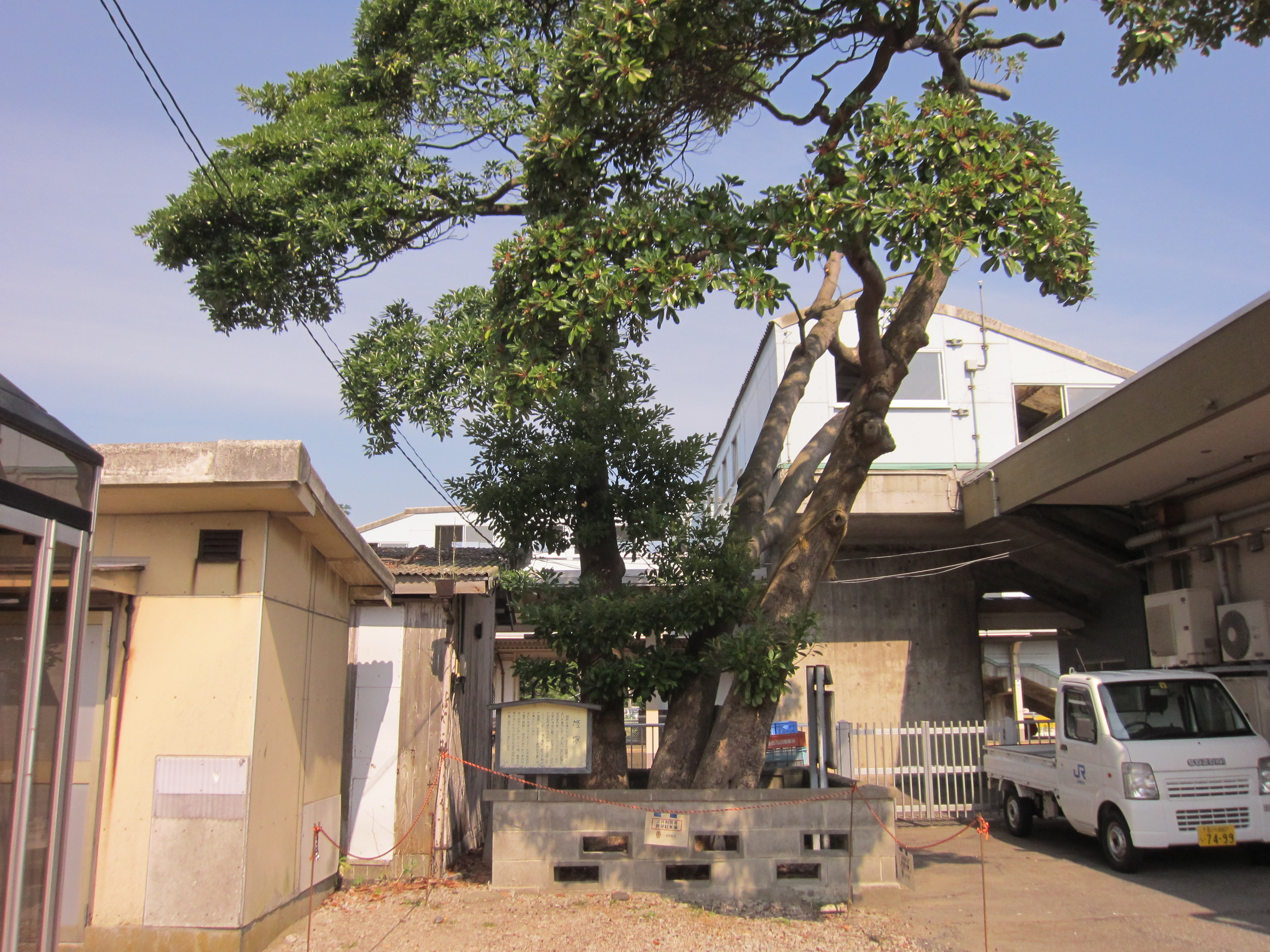 姫塚 (羽咋七塚)